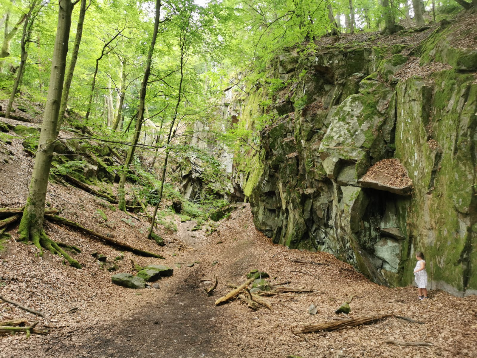 Die Noriswand bei Aschaffenburg